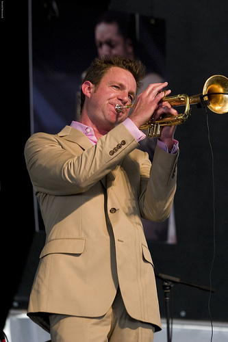 Jeremy Davenport, jazz trumpet player